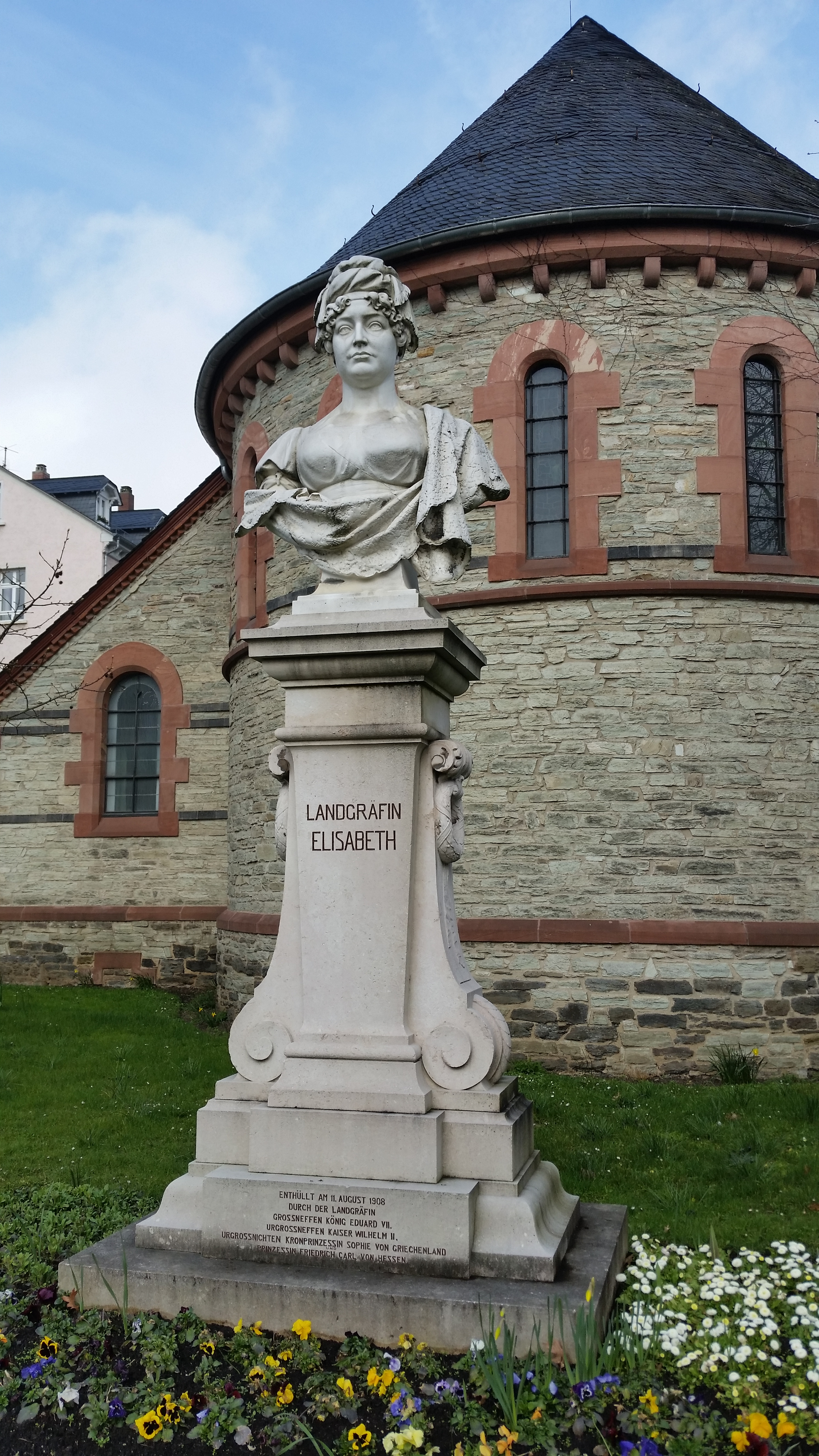 Das Denkmal wurde am 12. August 1908 in Anwesenheit vom (deutschen) Kaiser Wilhelm II. und (englischen) König Edward VII. enthüllt.